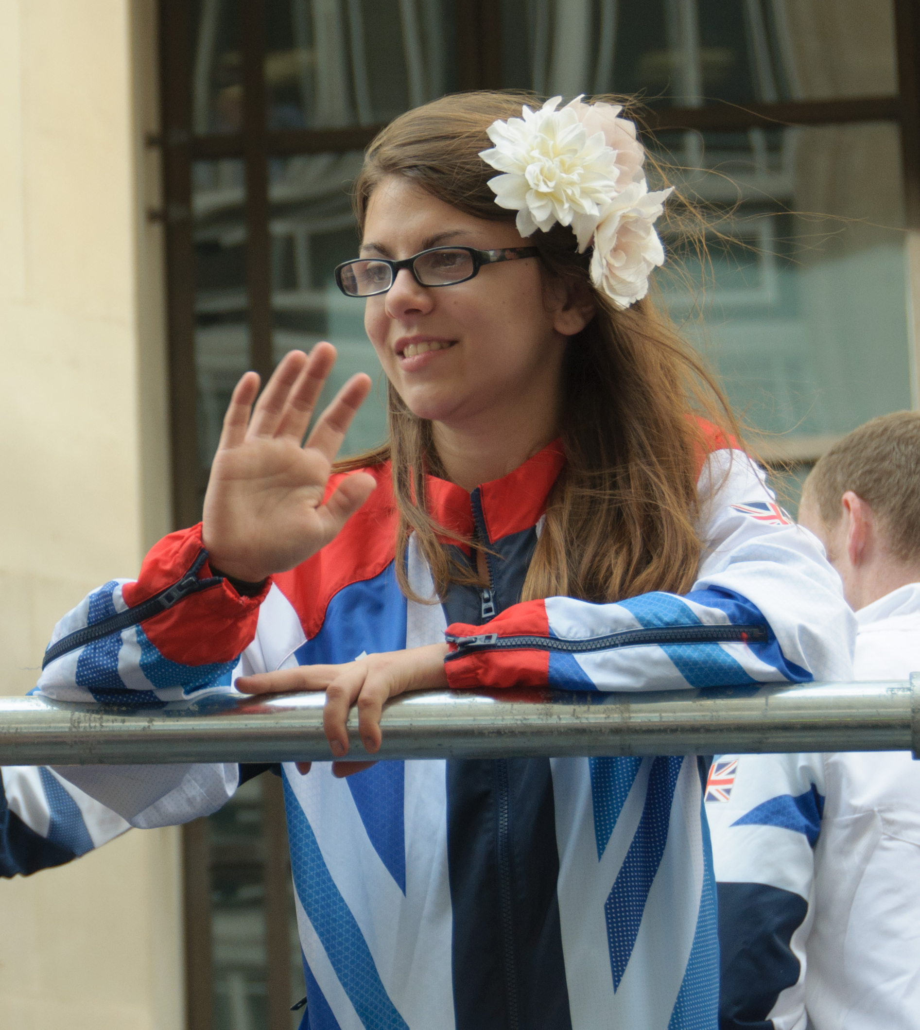 Sophie Kamlish